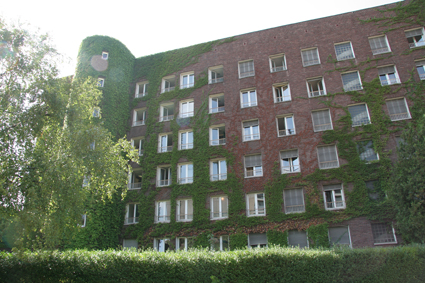 Maison de Norvège, Cité internationale universitaire de Paris